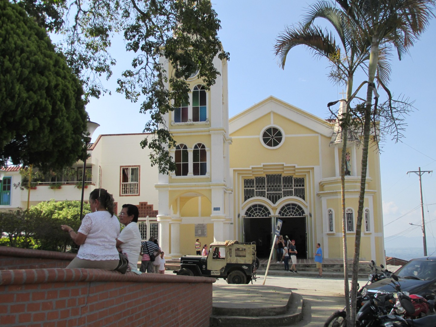 Buenavista, Quindío.